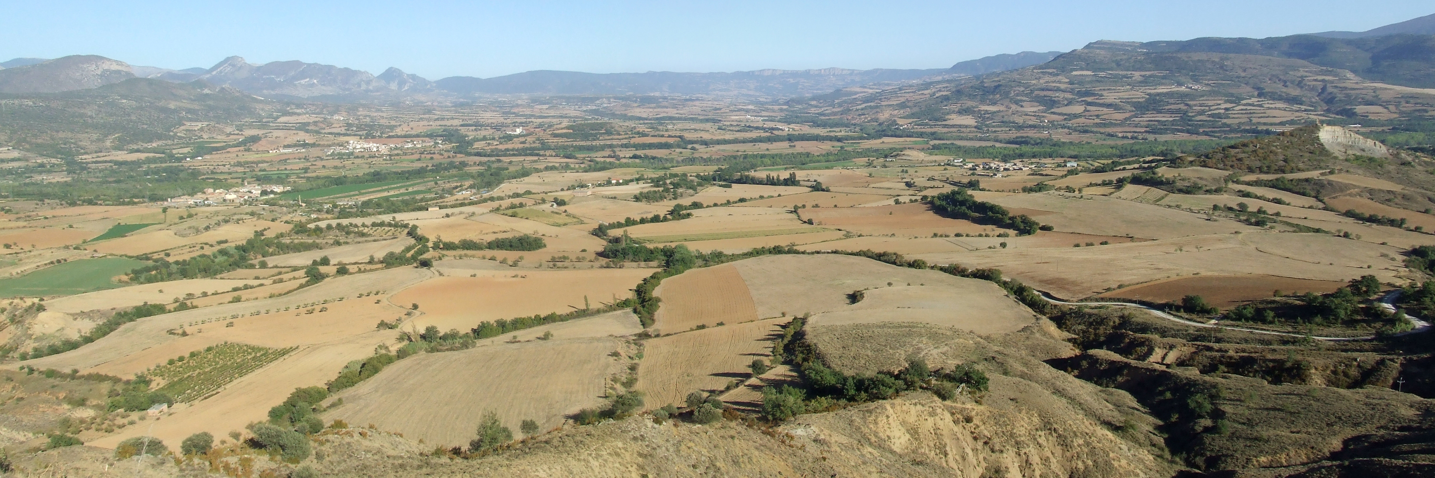 L'antic terme de Palau de Noguera (Tremp, Pallars Jussà)